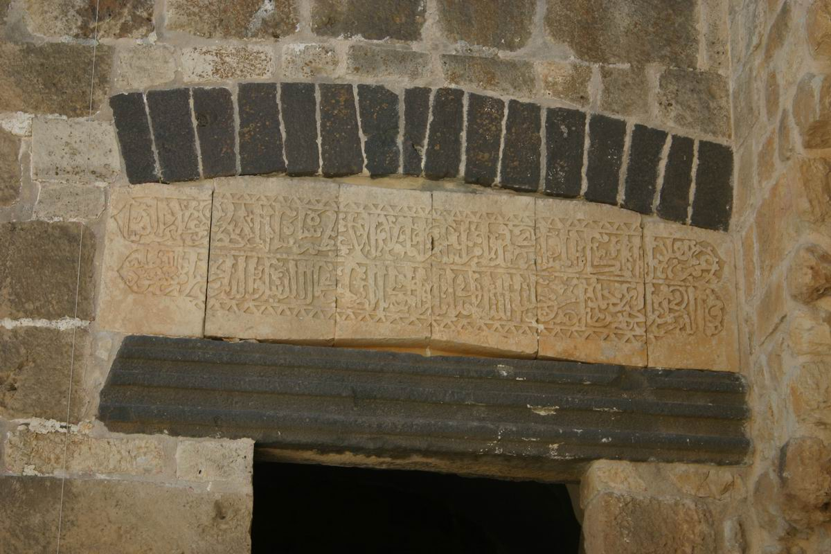 Masyaf